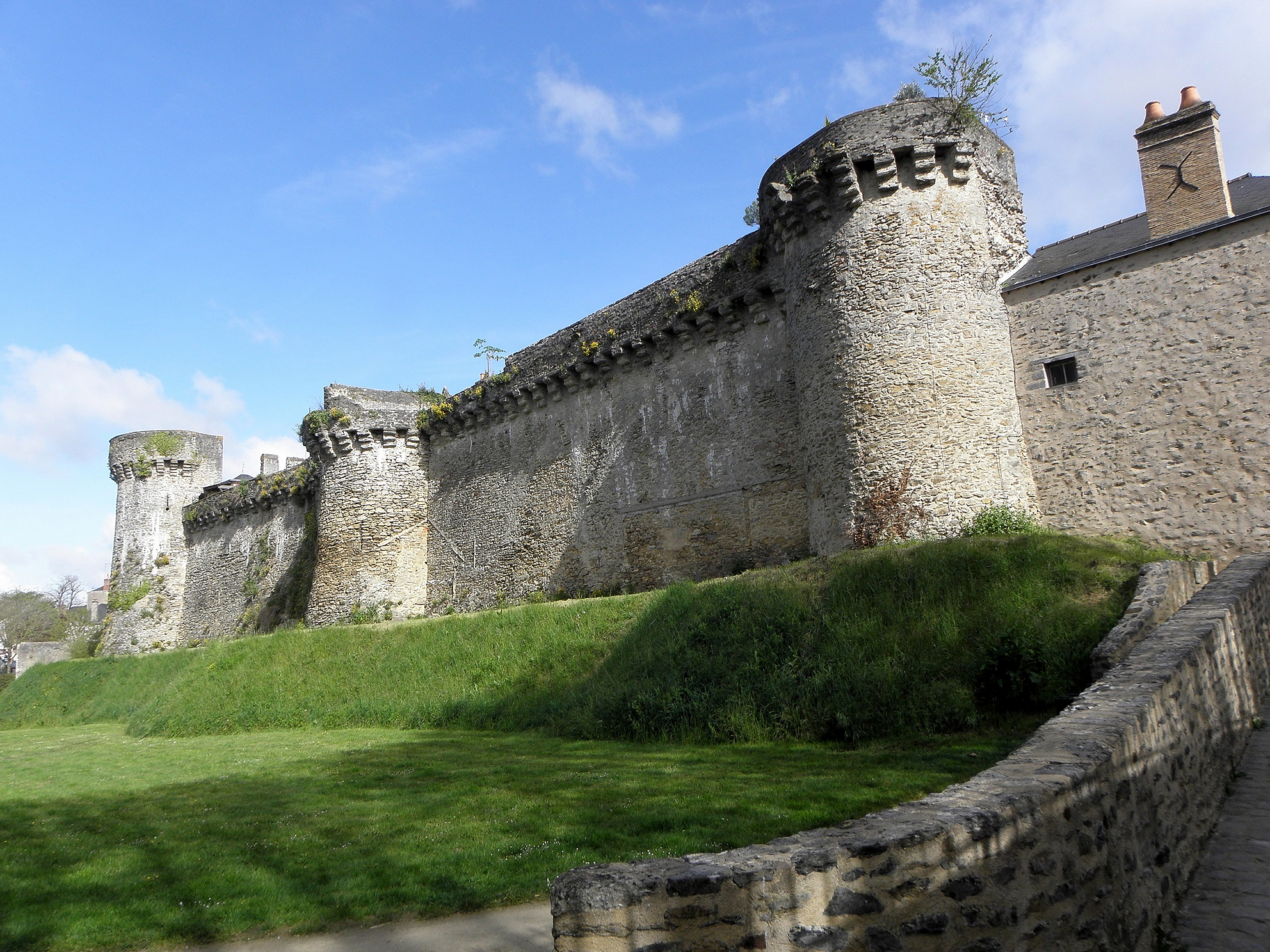 Remparts sud de la ville de Laval (53). Promenade Anne d'Alègre.